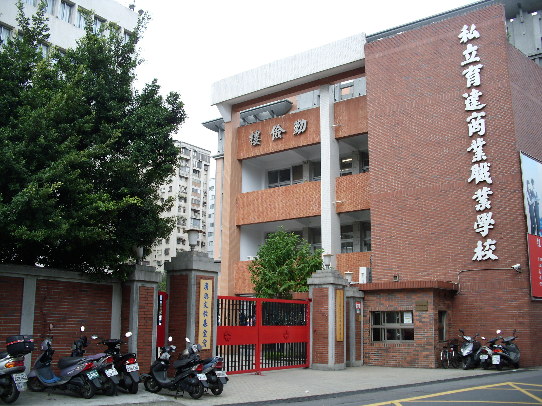 臺北市私立育達高級商業家事職業學校，位於臺灣臺北市松山區寧安街12號。Bân-lâm-gú: 臺北市私立育達高級商業家事職業學校